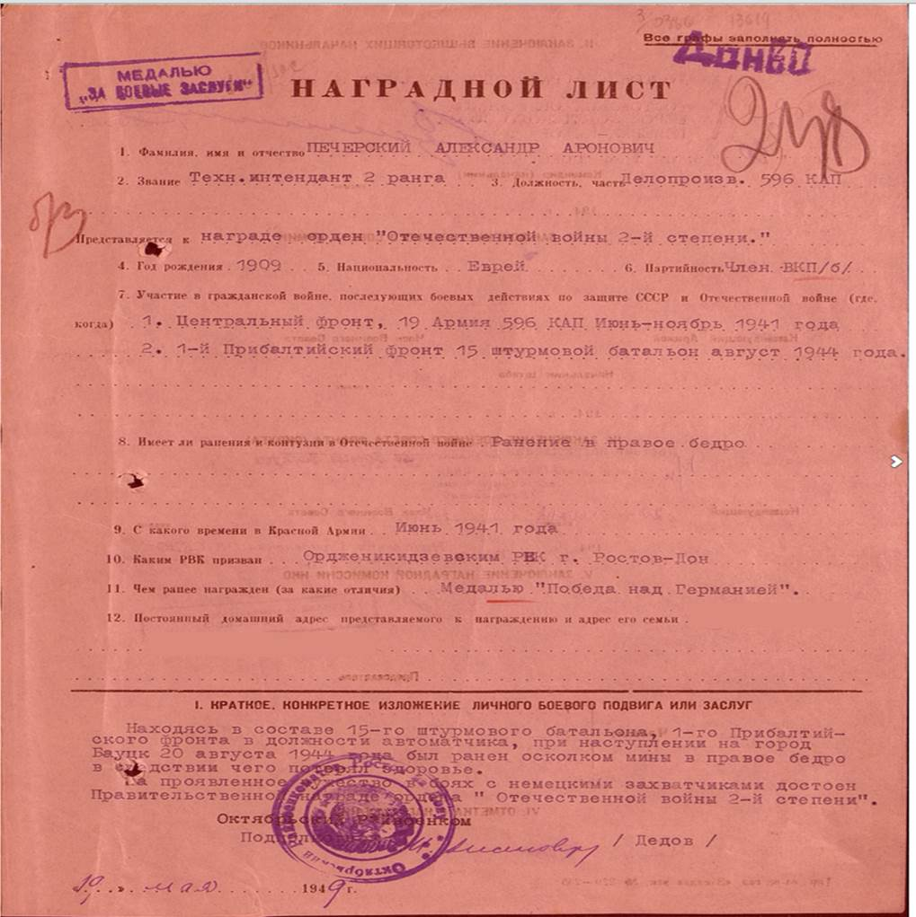 Представление Alexander Pechersky к ордену «Отечественная война II степени»